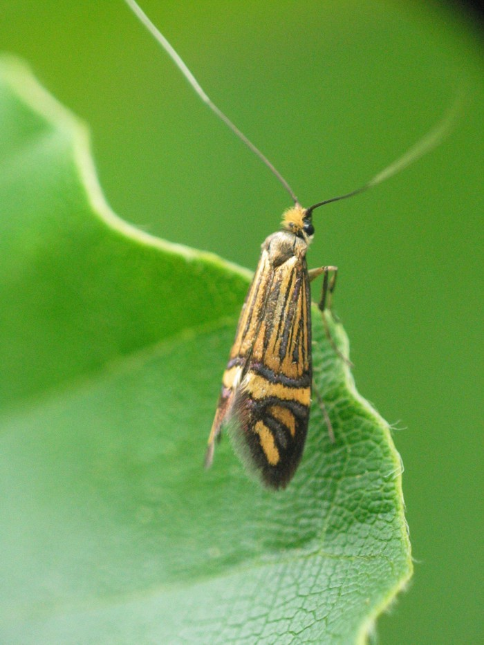 male: Salzburg, Osterhorngruppe, St. Gilgen, Falkenstein, Scheffelblick, 6.6.2004 more info (in german)